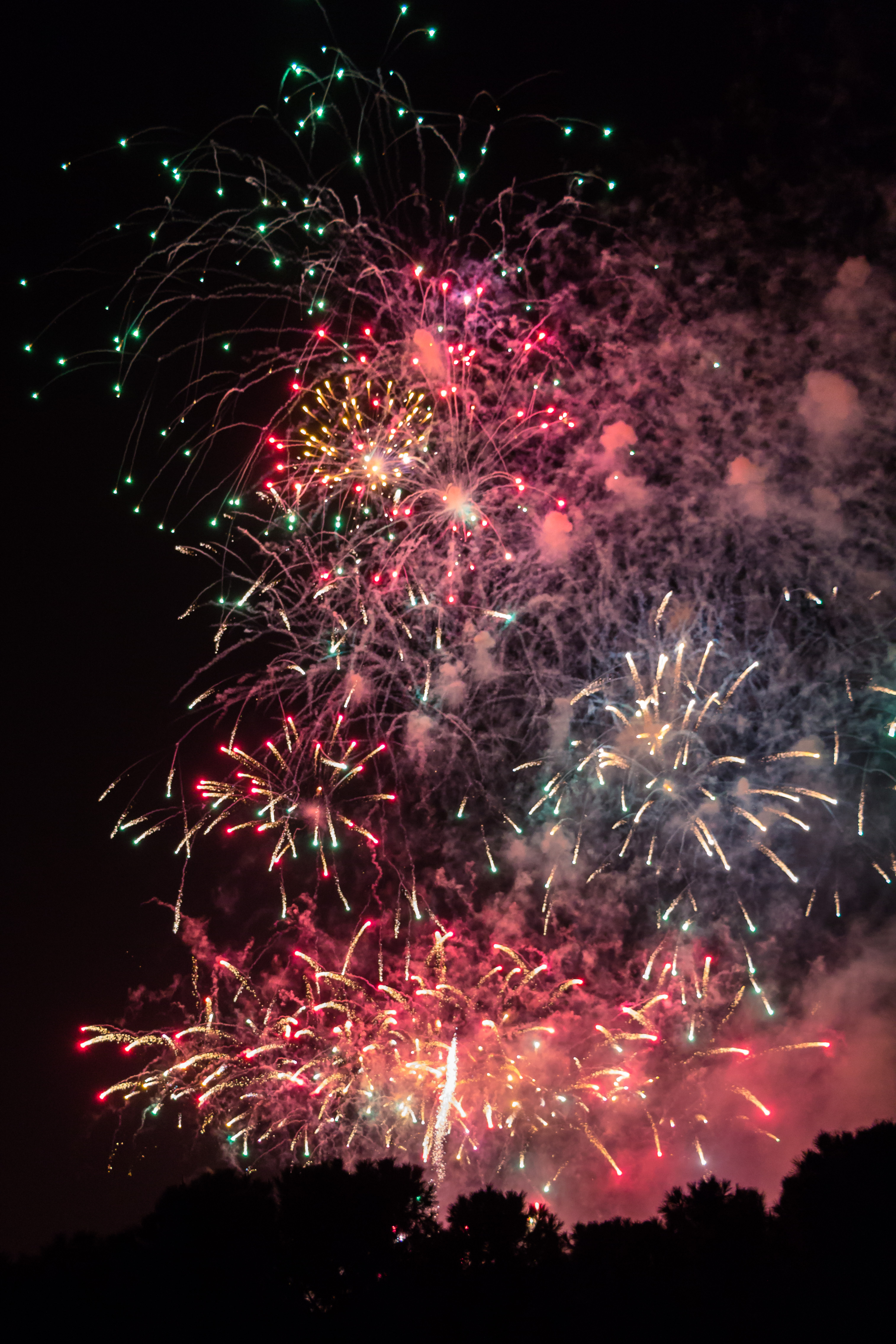 Los mayores fuegos artificiales se reservan para la Nit del Foc, espectáculo que congrega a grandes multitudes alrededor del antiguo cauce del Turia This is a photography of a Folklore festival in Spain (Wikidata id Q1143768).